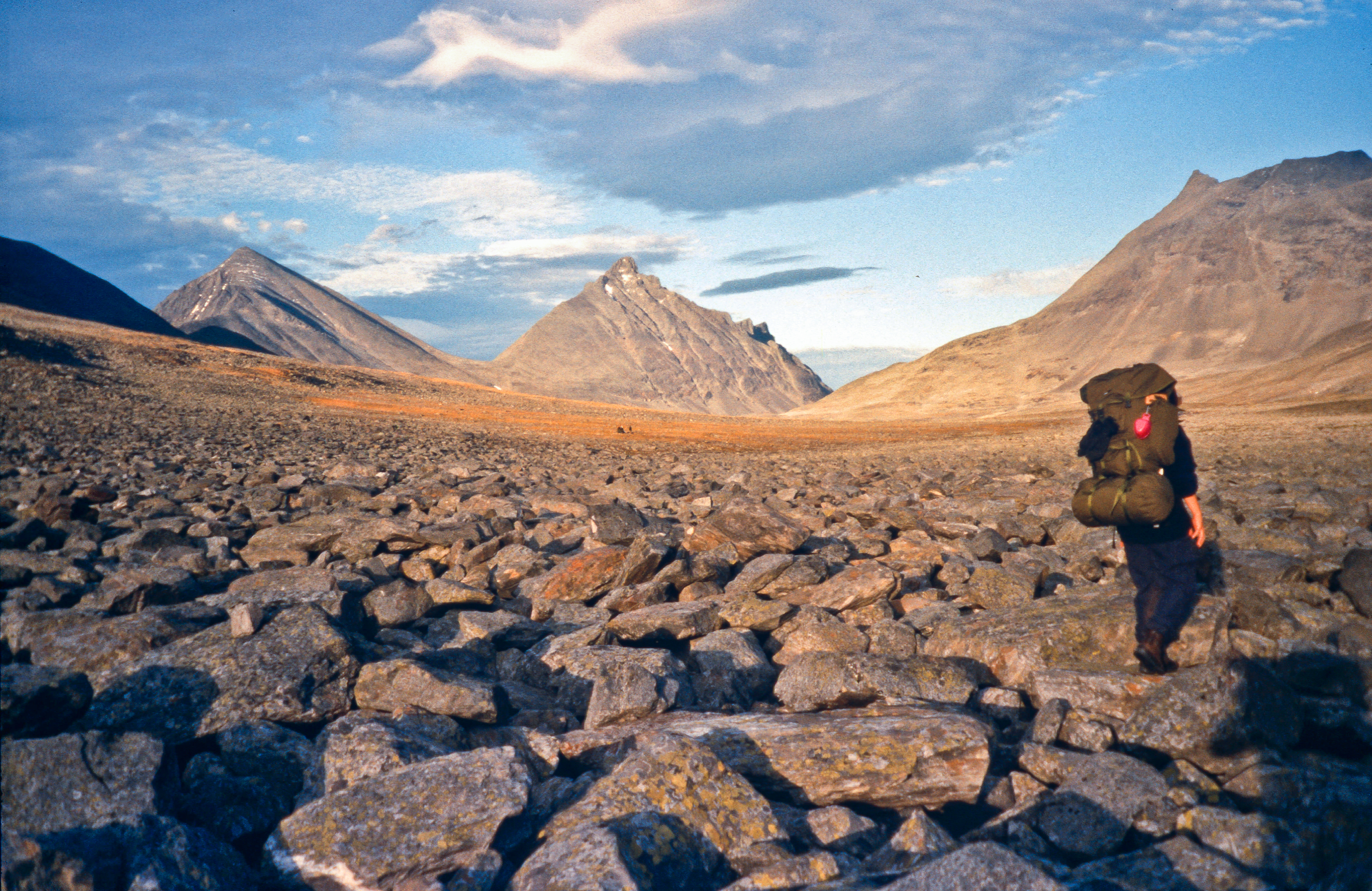 Auf etwa 1.200 müNN im Kaskasavagge am Kebnekajse-Massiv in Nordschweden